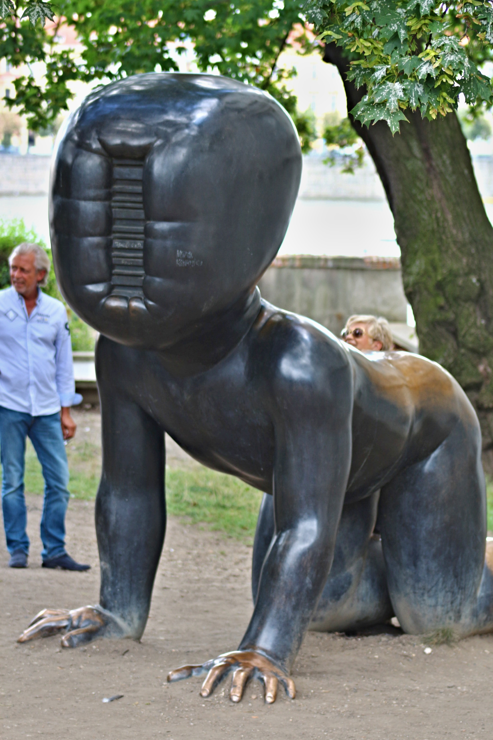 David Černý miniko